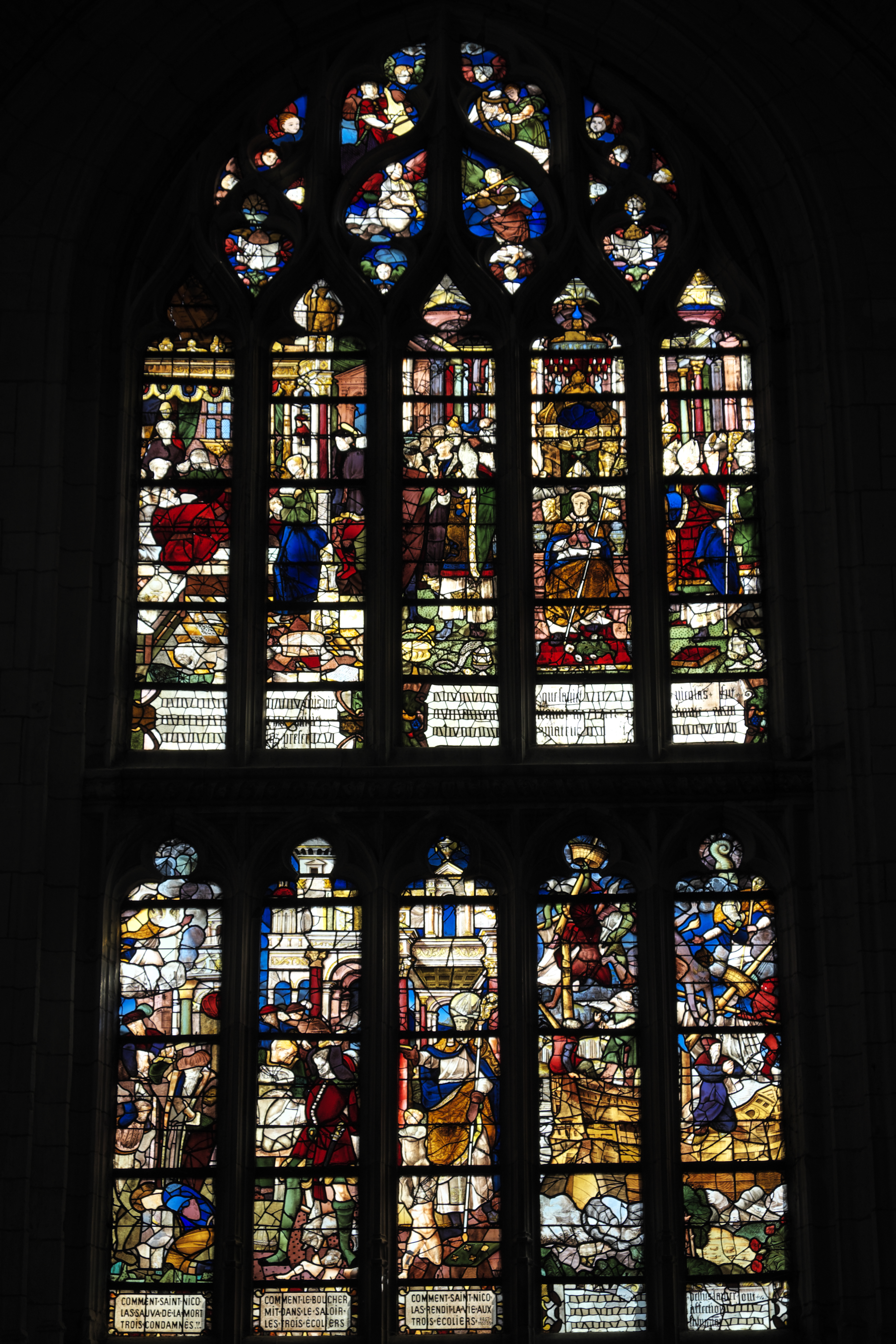 Katholische Kirche Saint-Pierre und Saint-Paul in Aumale im Département Seine-Maritime (Haute-Normandie/Frankreich), Bleiglasfenster aus dem 16. Jahrhundert, Darstellung: Szenen aus dem Leben des hl. Nikolaus